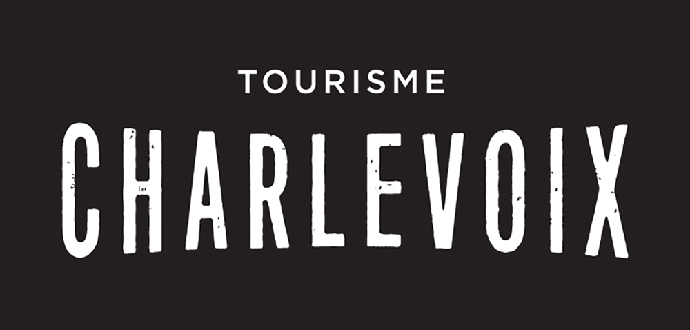 Logo de Tourisme Charlevoix, 2016.